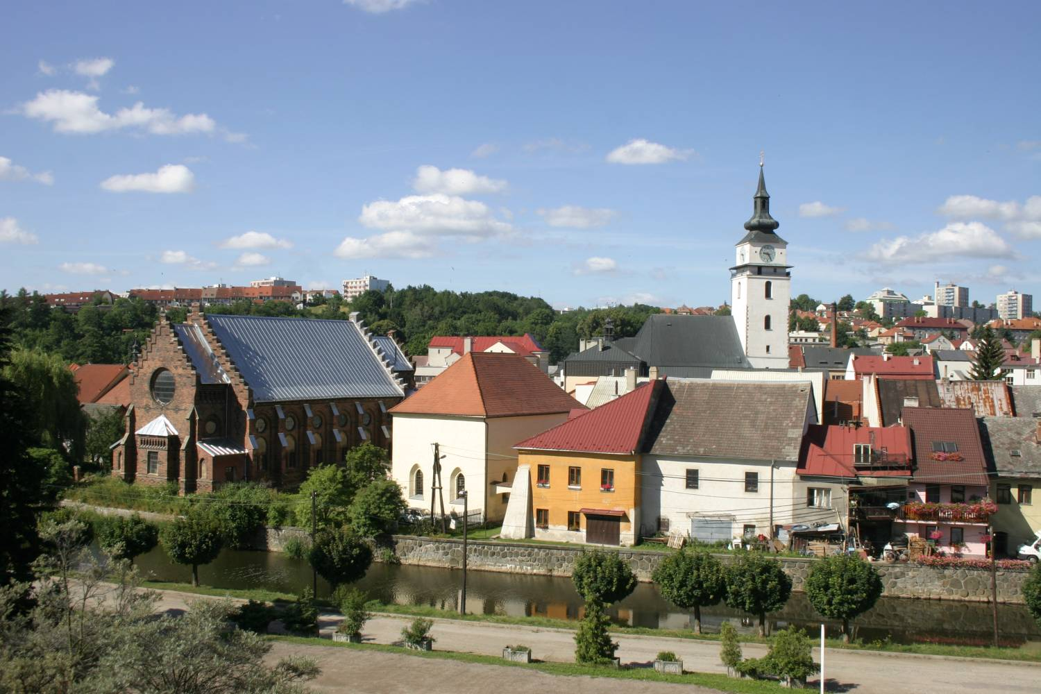 Velké Meziříčí, centre of the town from north - Velké Meziříčí, centrum města od severu